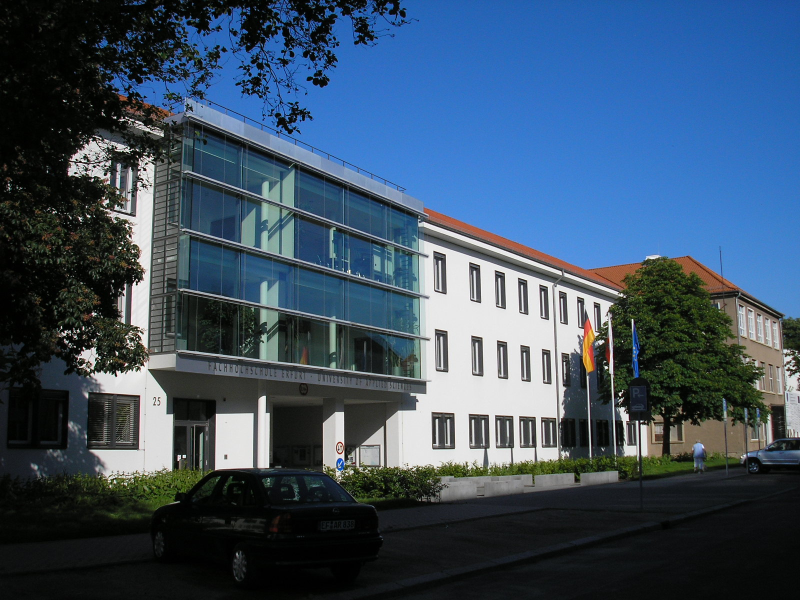 Eingang der Fachhochschule in Erfurt.